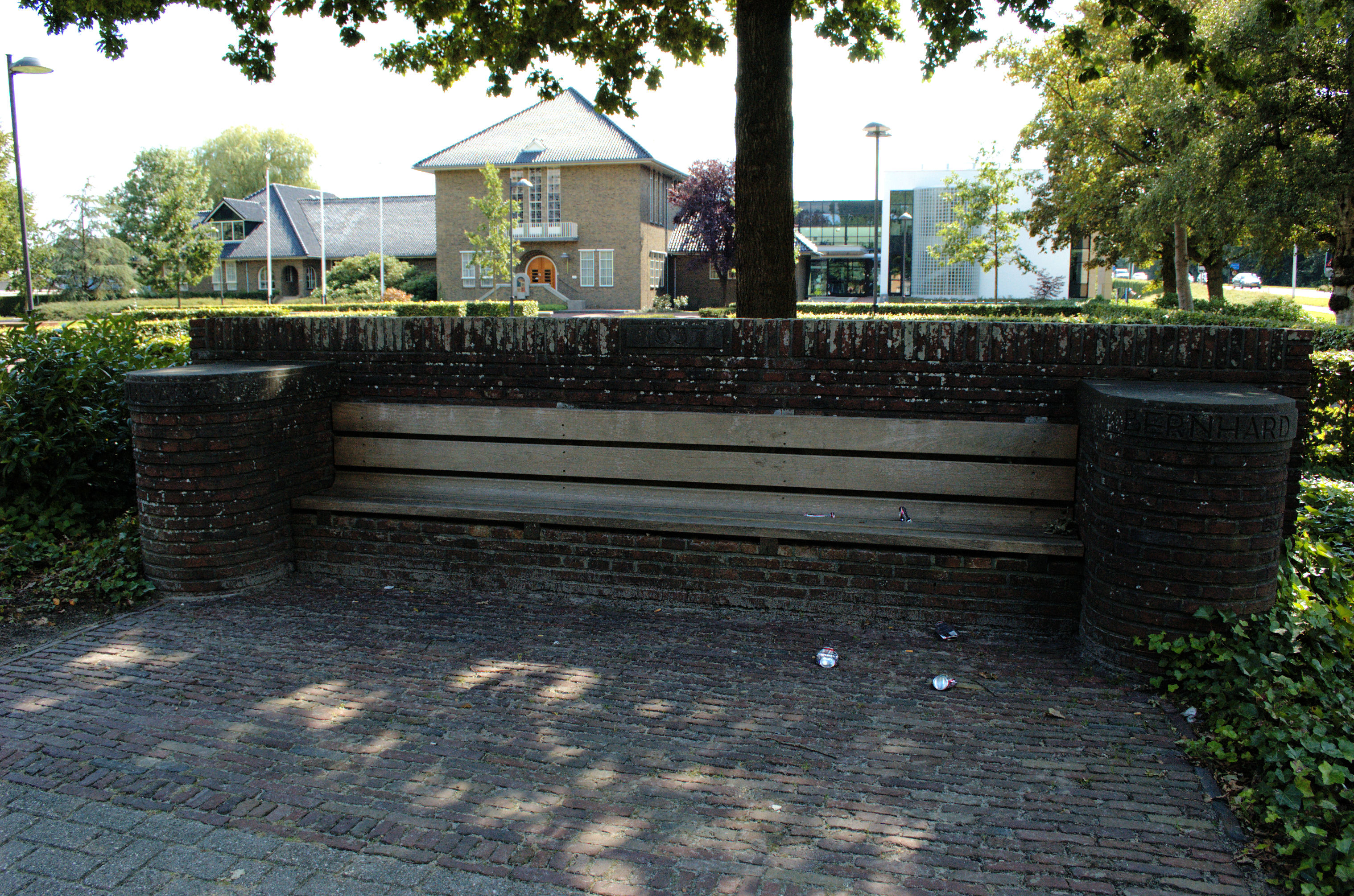 Zitbank, opgericht ter gelegenheid van het huwelijk van Prinses Juliana met Prins Bernhard in 1937. Bij het gemeentehuis van Tytsjerksteradiel, Raadhuisweg 7, Burgum